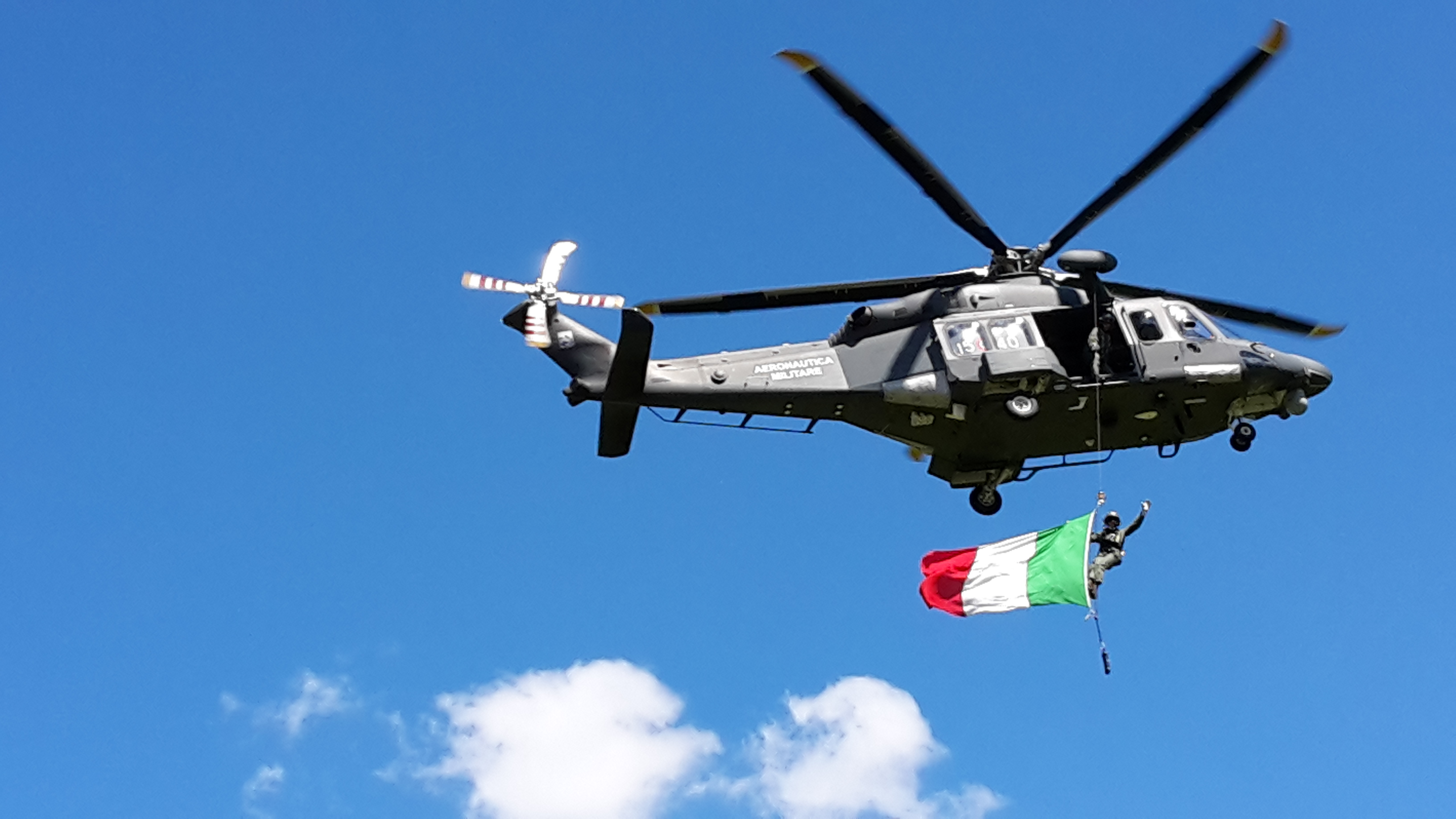 HH-101 Caesar a Dobbiaco